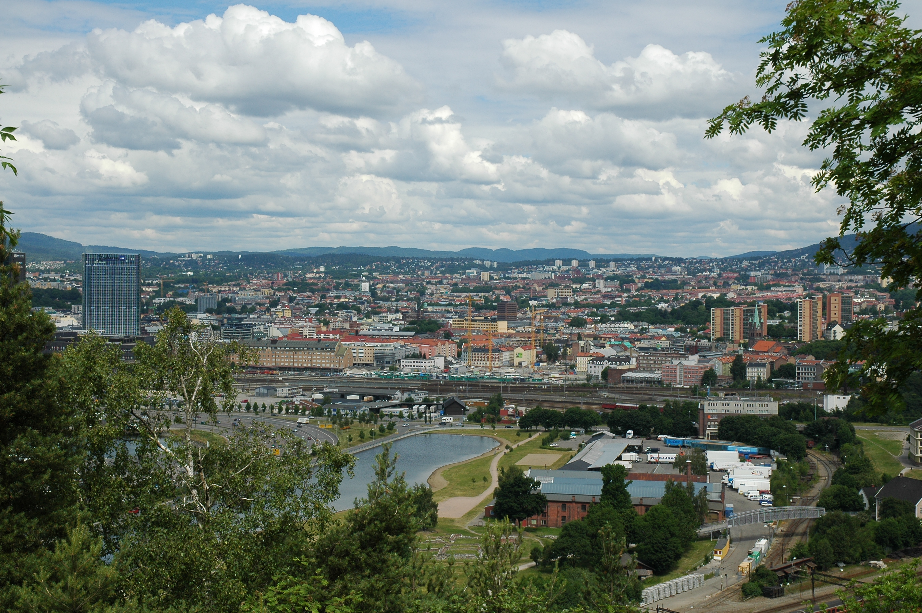 Utsikt rett nordover fra Ekebergrestauranten på Ekeberg, Oslo. Man ser primært indre Oslo Øst, med Oslo Plaza i Bjørvika til venstre i bildet som avgrensning i vest, og Grønland Kirke i Grønlandsleiret til høyre i bildet som avgrensing i øst